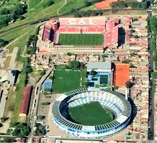 Cancha Independiente y Racing a 300 Mts de distancia